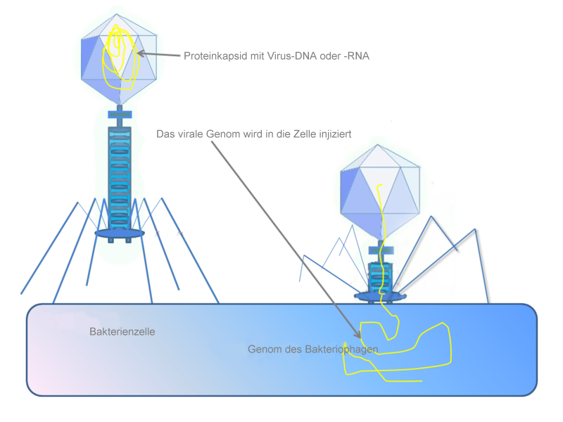 Zeichnung, die darstellt, wie einige Baktriophagen Zellen infizieren. Die Zeichnung ist nicht maßstabsgetreu – Bakteriophagen sind etwa 100 mal kleiner als Bakterien.